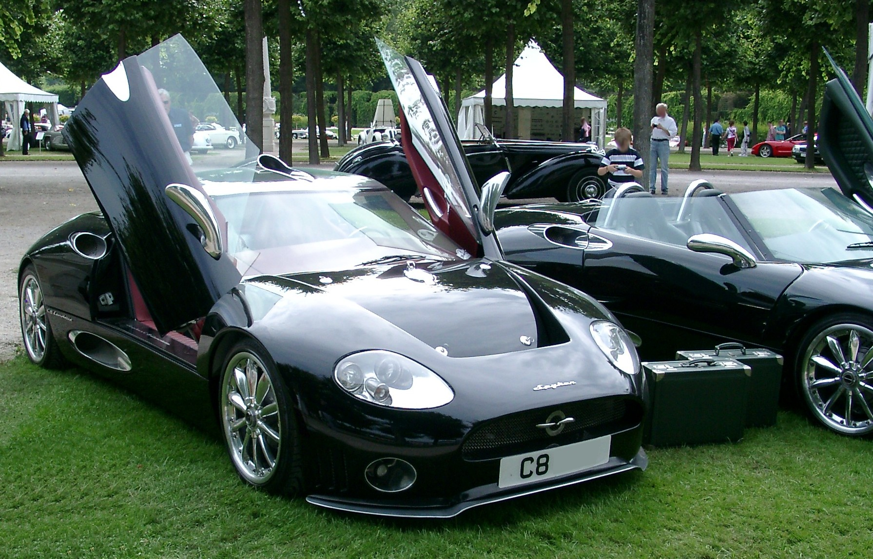 Spyker C8, fotografiert anläßlich des European Concours d'Elegance 2002 in Schwetzingen